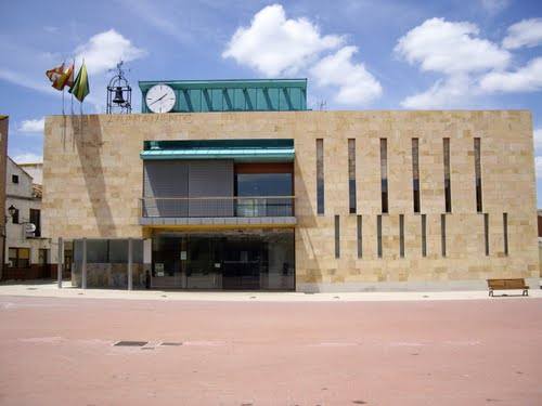 Ayuntamiento de Pedrajas de San Esteban (Valladolid, España)